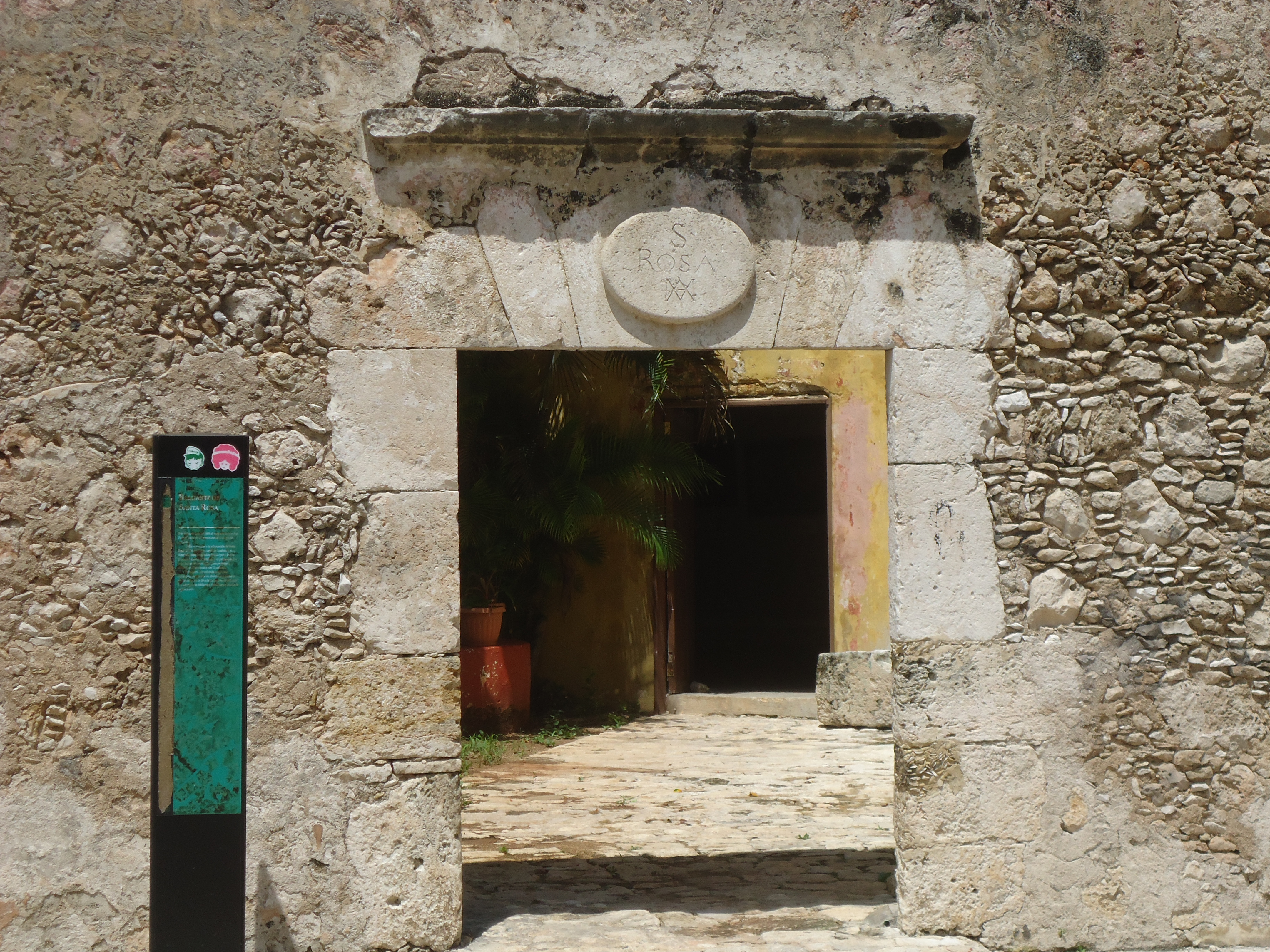 Fotografía del Baluarte de Santa Rosa, San Francisco de Campeche, Campeche